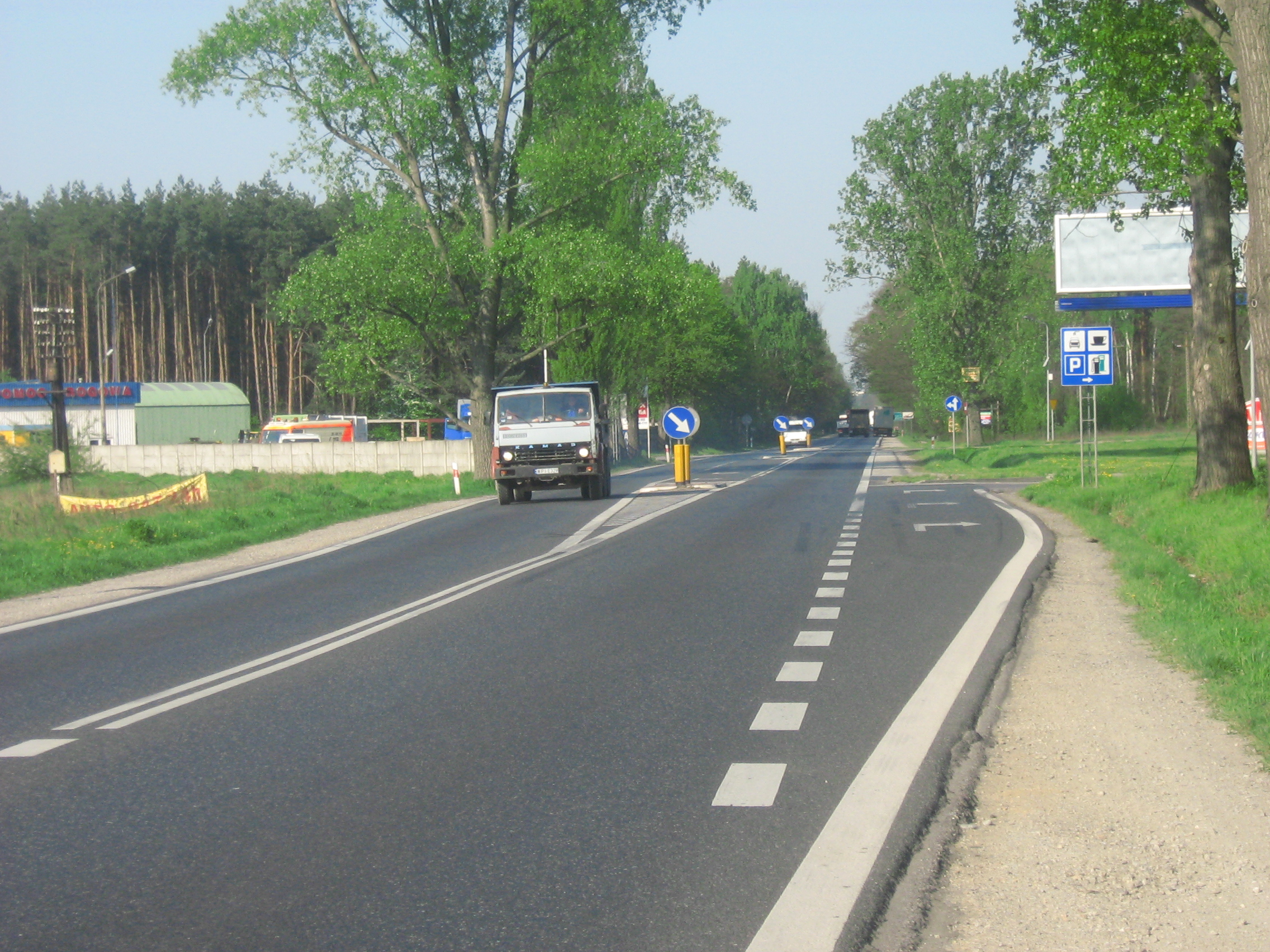 Droga krajowa nr 50 w Górze Kalwarii.